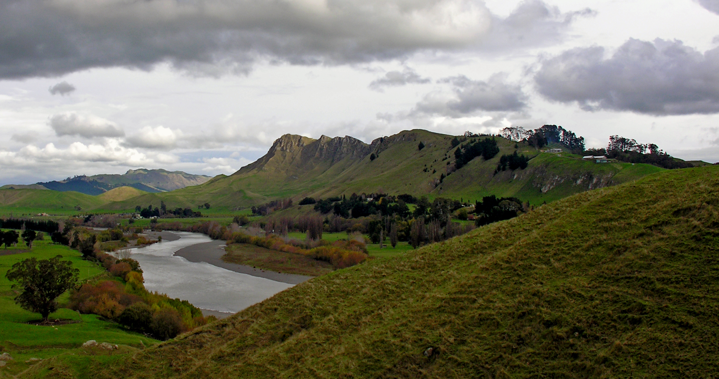 Tukituki River and Te Mata Peak, Hawkes Bay, New Zealand, 12 May 2006